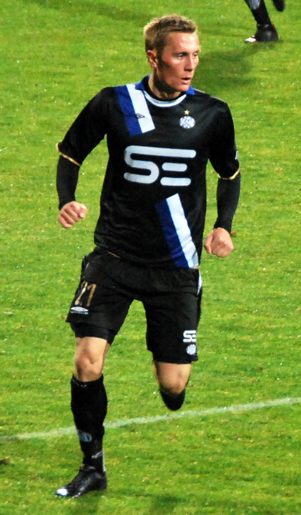 Fodboldspilleren Sebastian Andersen fra Esbjerg fB. Her i 1. divisionskampen imellem Viborg FF og Esbjerg fB på Viborg Stadion.